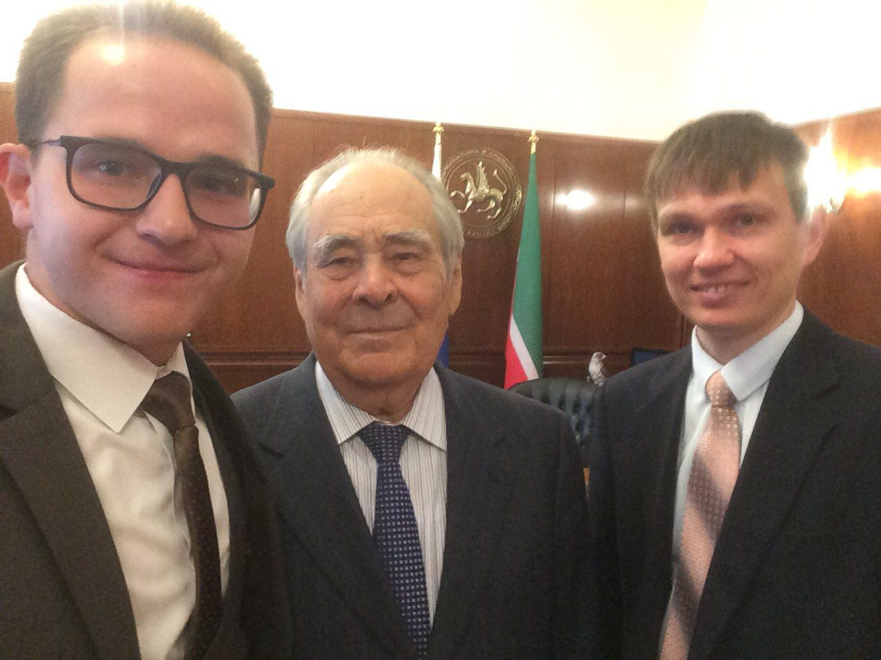 Встреча татароязычных викимедистов с Государственным Советником Республики Татарстан М.Ш.Шаймиевым